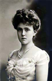 Marie Gabrielle von Bayern